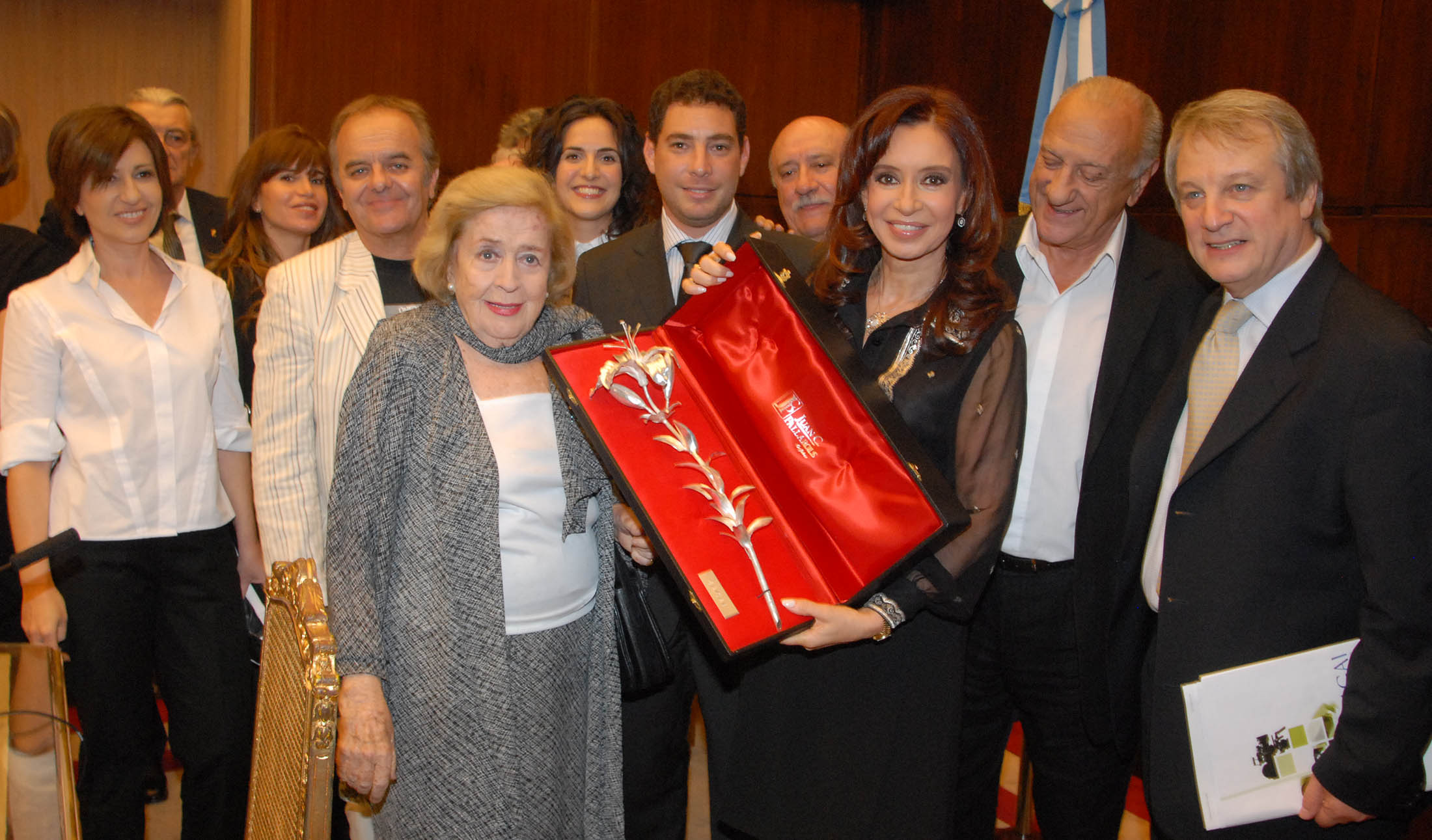 La presidenta Cristina Fernández recibió esta tarde en la Casa de Gobierno a un grupo de actores quienes le agradecieron la reglamentación de la Ley del intérprete.